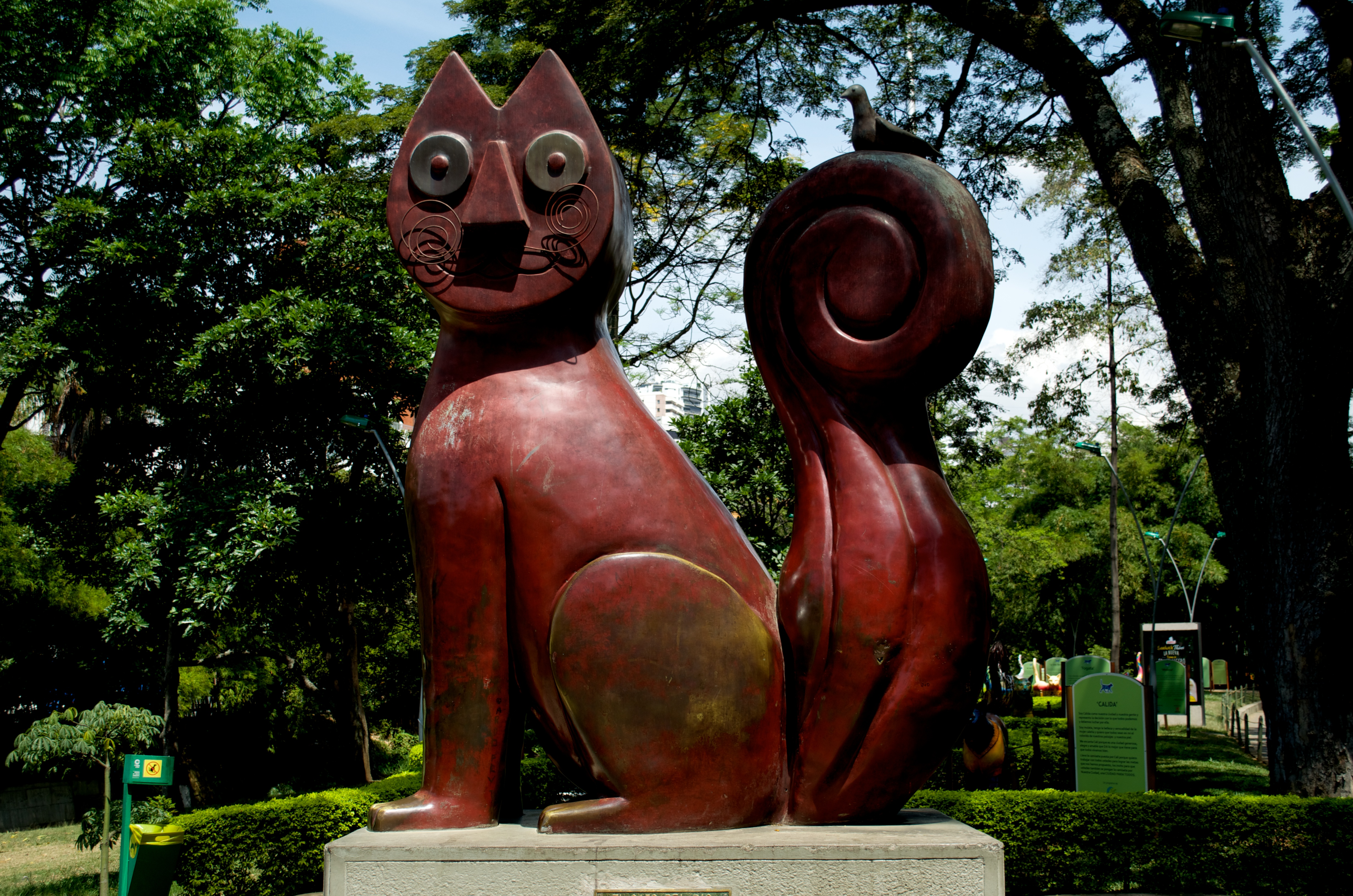 El Gato del Río